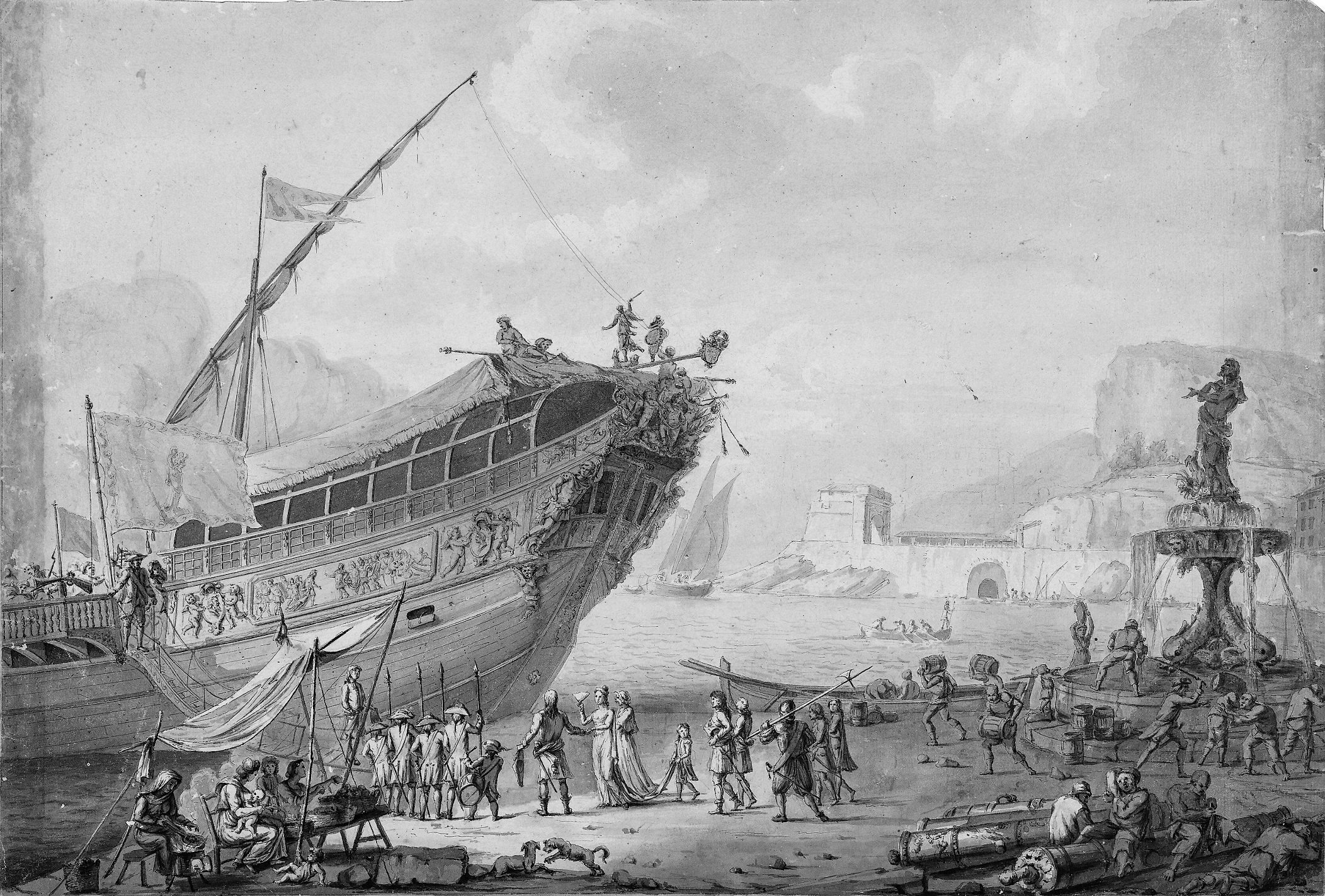 Port de mer ouvert, Jacques-Félix Brun, plume et lavis d’encre noire, 42 x 62,7 cm, Don Brun 1872. Musée national de la Marine, Toulon, Inv. : 968.5.1